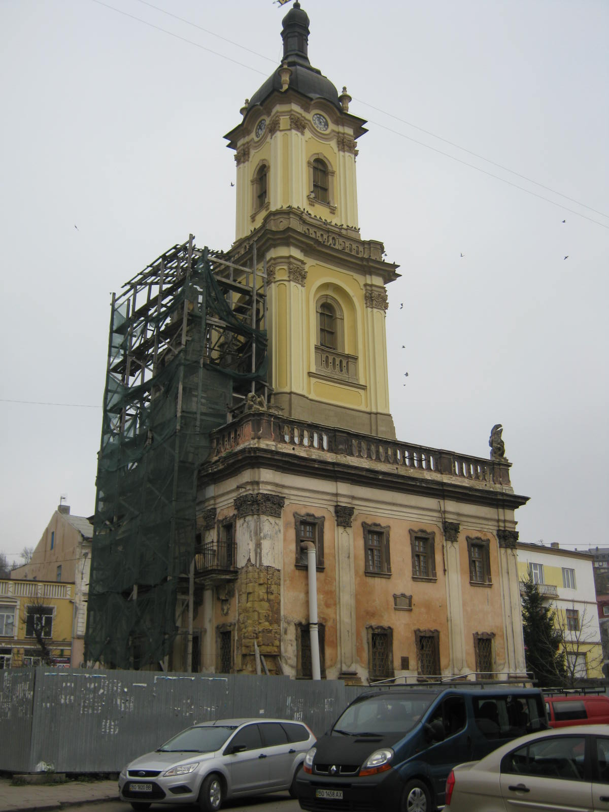 Ратуша в Бучачі. 26.10 2013